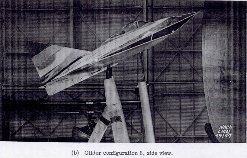 Der Versuchsgleiter DM-1 nach Umbauten durch die NACA. Die Seitenflosse wurde verkleinert und scharfe Kanten am Rumpf angebracht. Die Haube gehörte ursprünglich zu einer Lockheed P-80